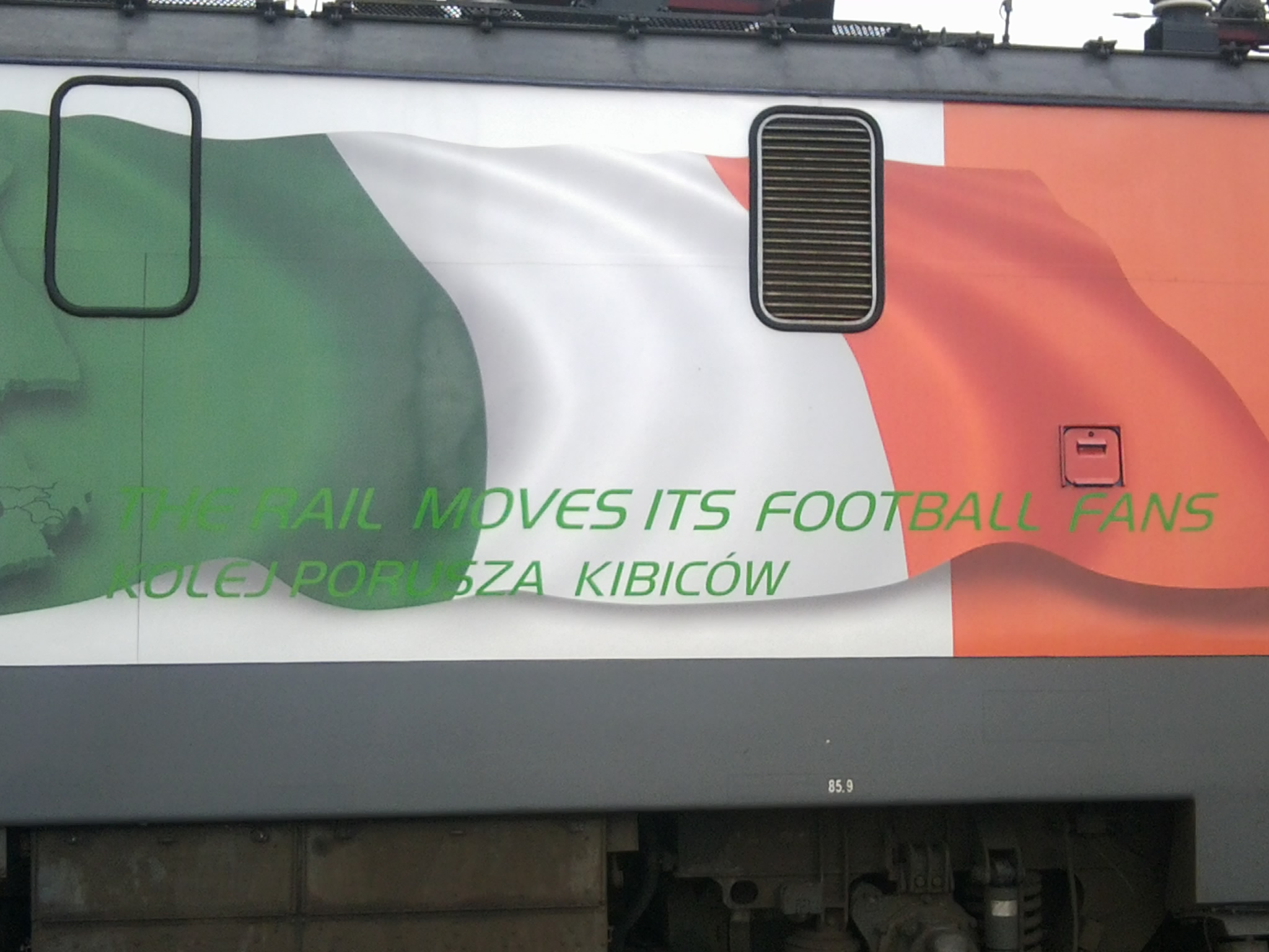 Lokomotywa EP09-036 oklejona w barwy Irlandii z okazji EURO 2012.